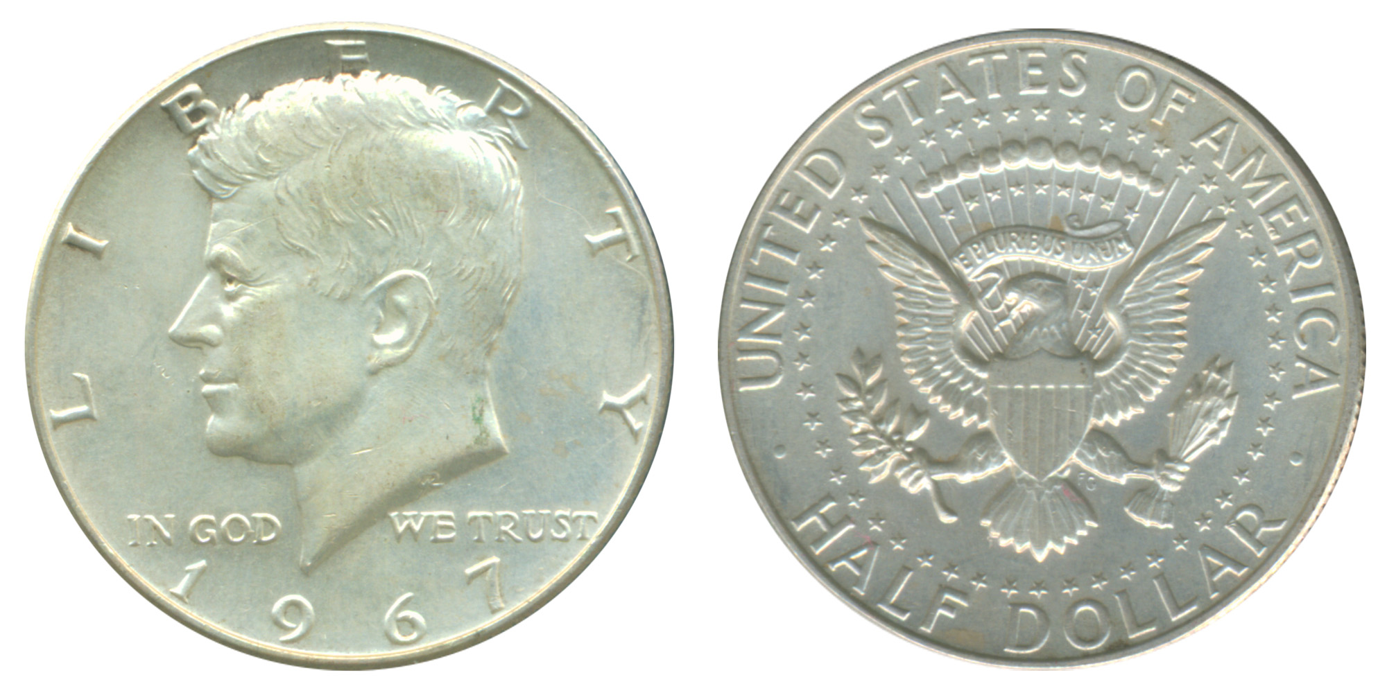 США. Полдоллара. 1967. Памяти Джона Кеннеди. Серебро